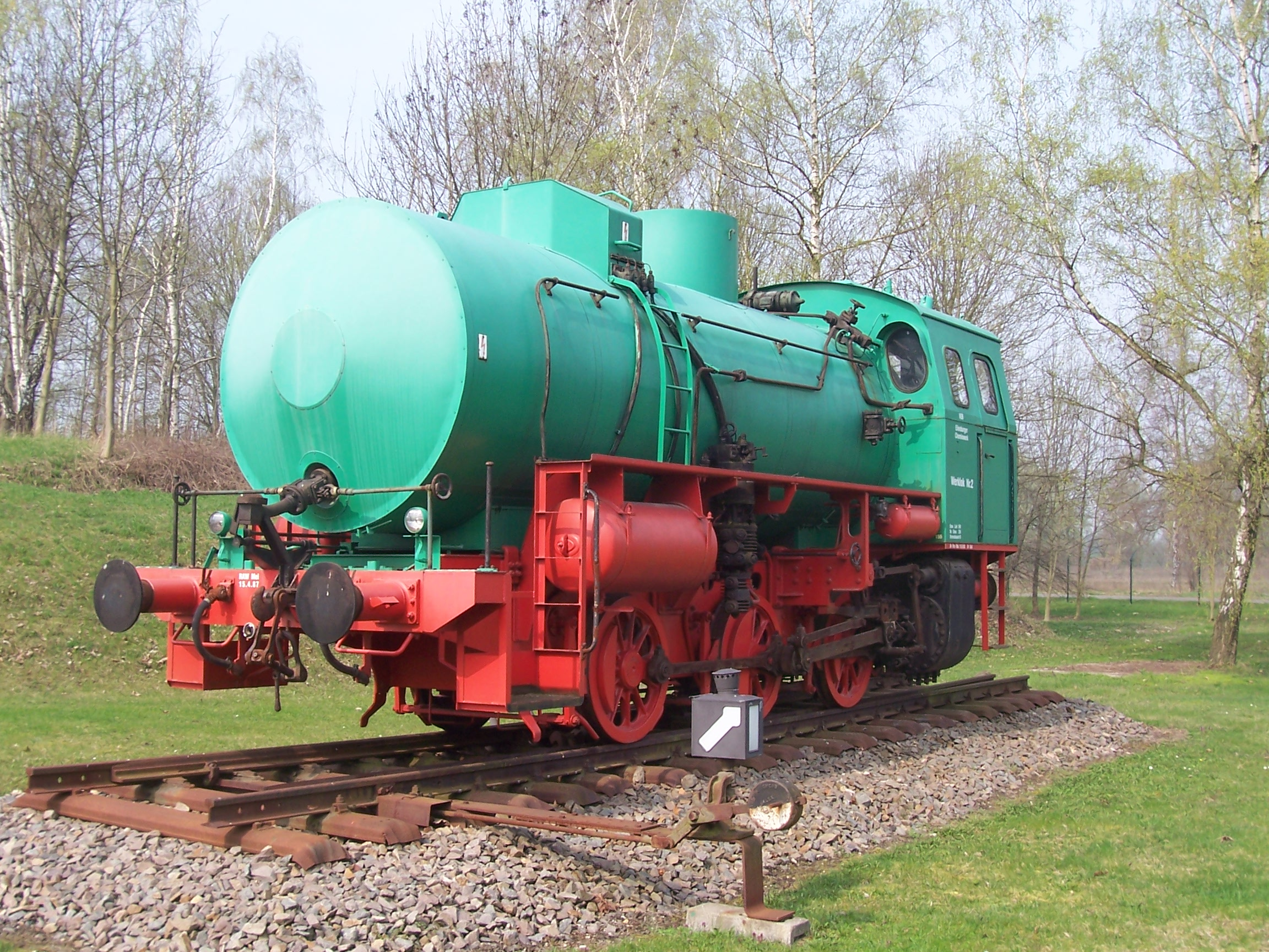 ECW-Werklok, Dampfspeicherlok "C" FCL 03155, Hersteller: Raw Helmut Scholz Meiningen 1987, Gewicht: 34 Tonnen, Geschwindigkeit: 30 km/h, Indienststellung und Einsatzort: 1987 in Eilenburg, ECW